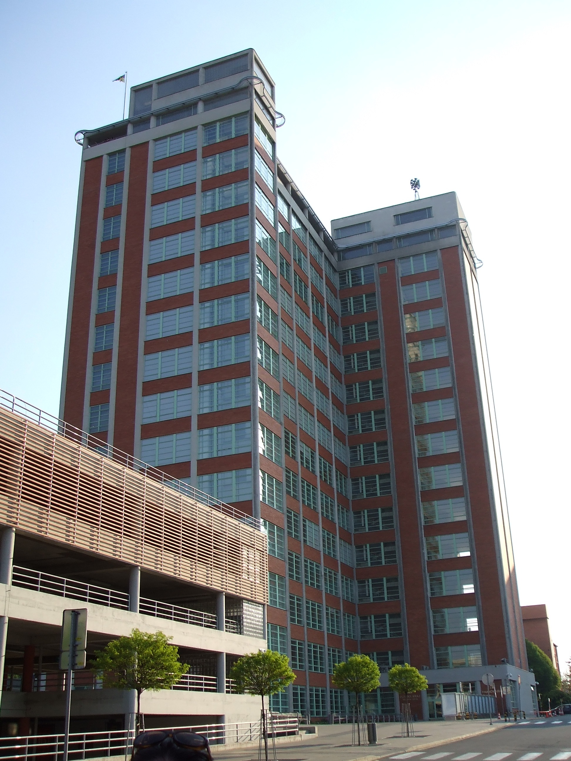 Jiná správní stavba - Baťův mrakodrap (Zlín), Zlín 21